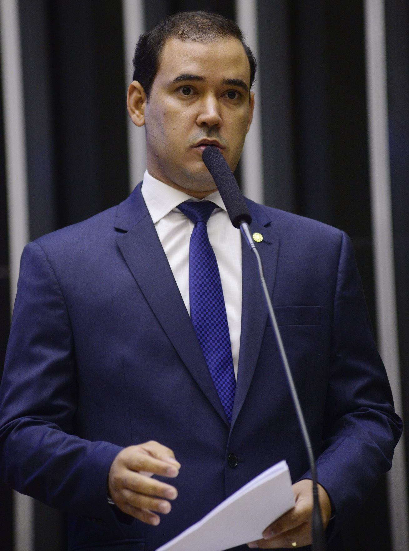 Vicentinho Júnior em setembro de 2015.